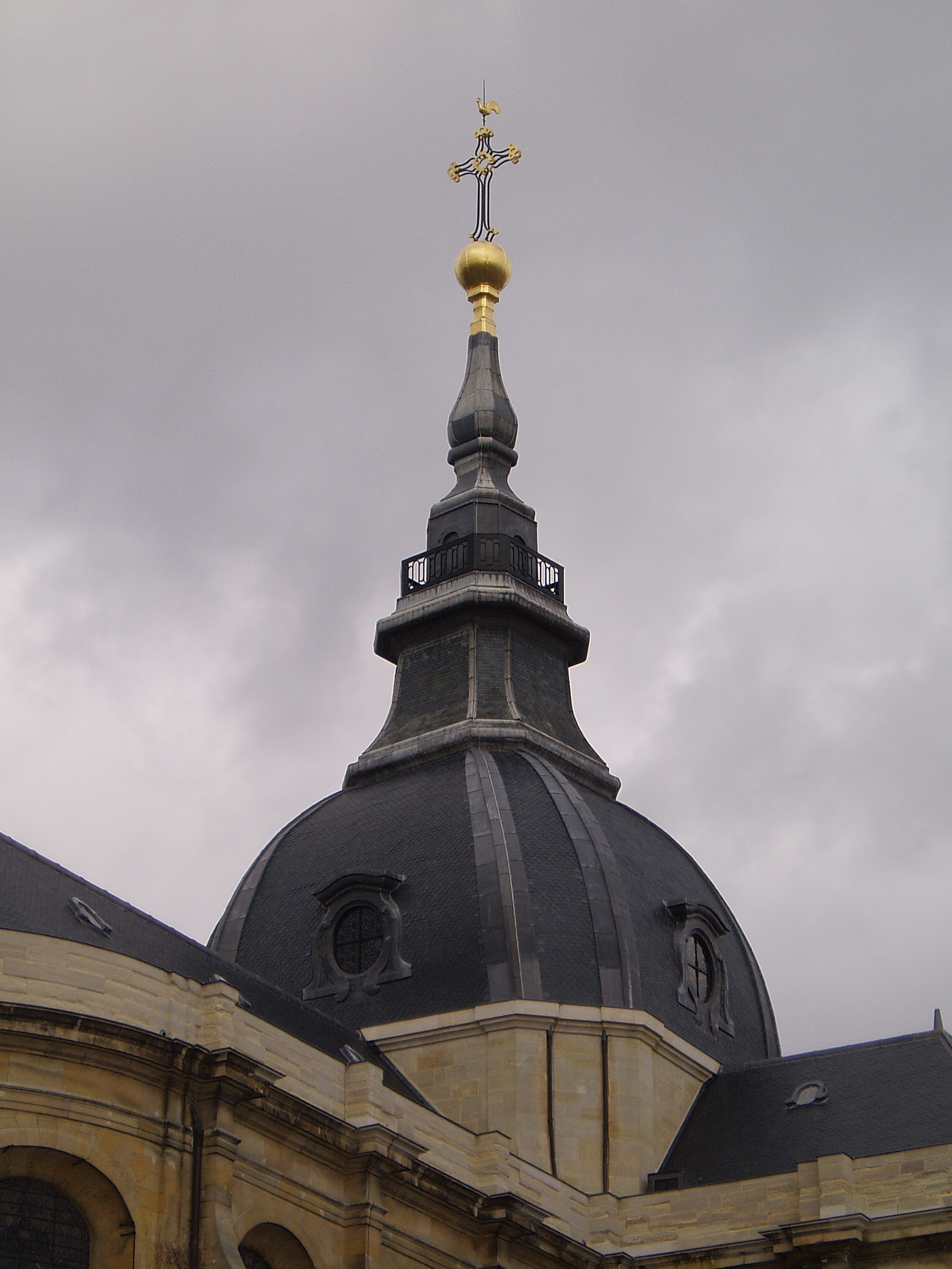 Cathédrale Saint Louis de Versailles Architecte : Jules Hardouin Masart de Sagonne Construction : 12 juin 1743 Inauguration : 24 août 1754 consacrée cathédrale en 1843